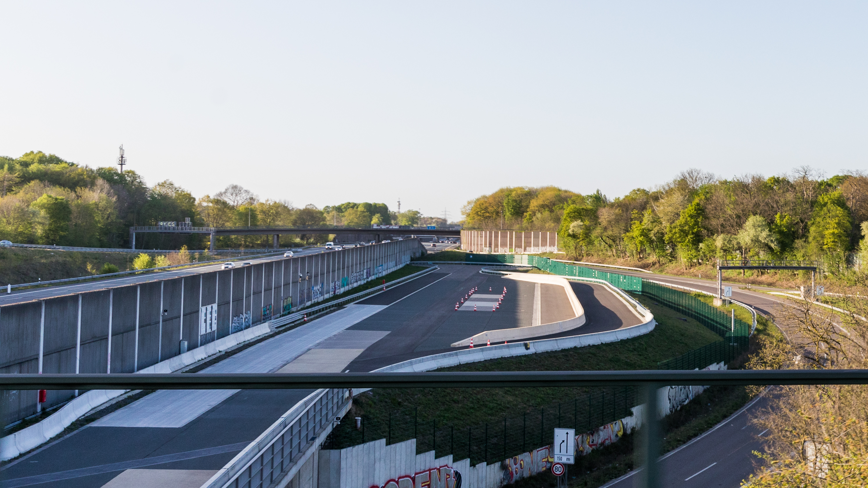 Testgelände „Demonstrations-, Untersuchungs- und Referenzareal der Bundesanstalt für Straßenwesen“ (duraBASt) im Autobahnkrreuz Köln-Ost, nördlicher Teil